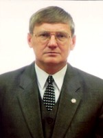 Виктор Евграфович Шудегов (род. 1952) — российский политический деятель, учёный-физик